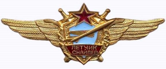 Нагрудный знак классной квалификации "Военный летчик-снайпер"